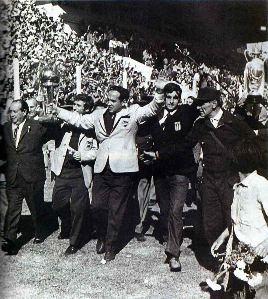 Mariano Mangano y Osvaldo Zubeldía, presidente y entrenador de Estudiantes de La Plata, respectivamente, con la Copa del Mundo 1968. Detrás y entre ellos, el capitán del equipo campeón Oscar Malbernat.